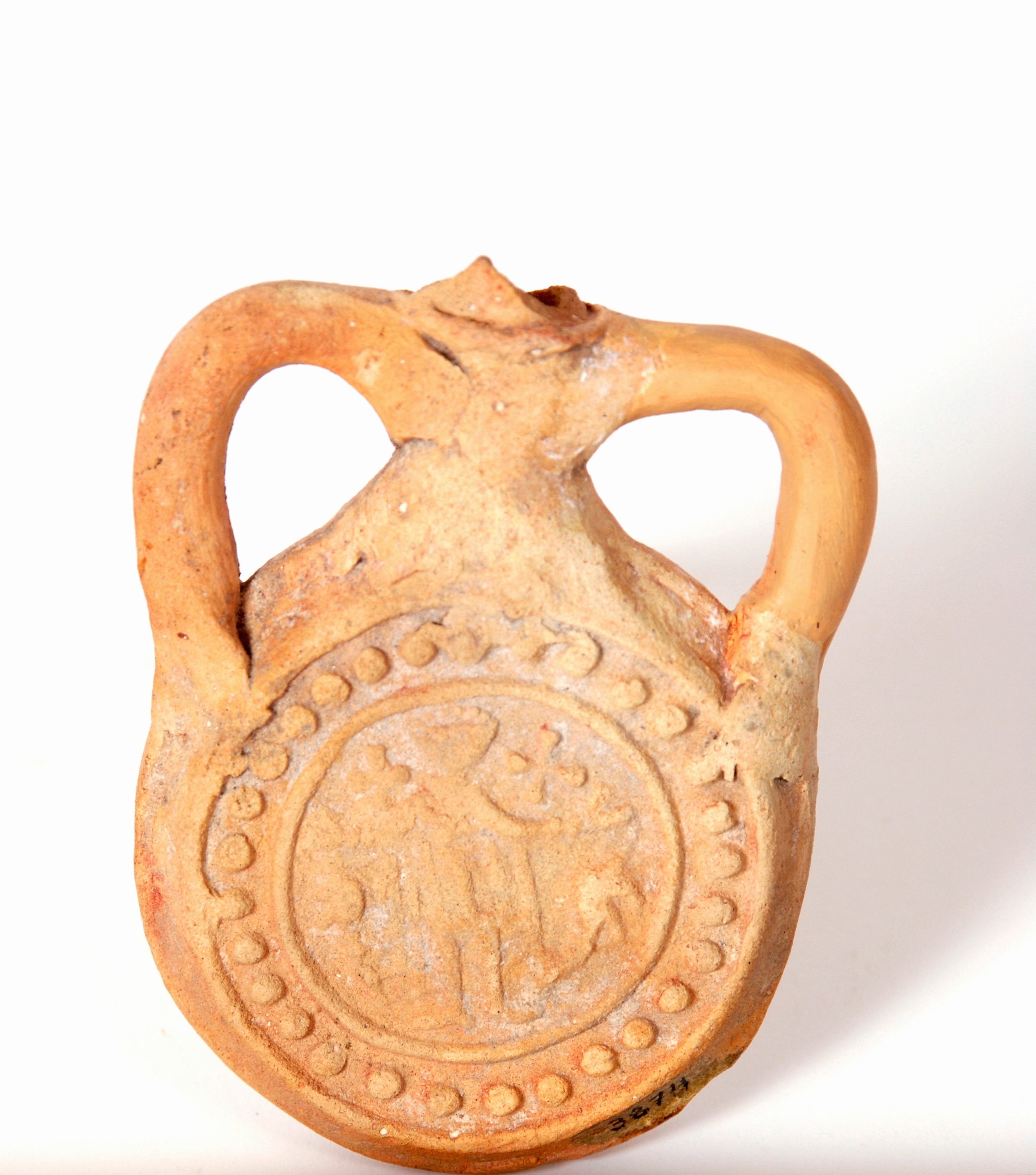 ánfora, de forma circular aplanada, con dos asas laterales.